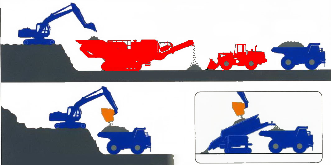 Funktionsprinzip des Backenbrechers im Schema